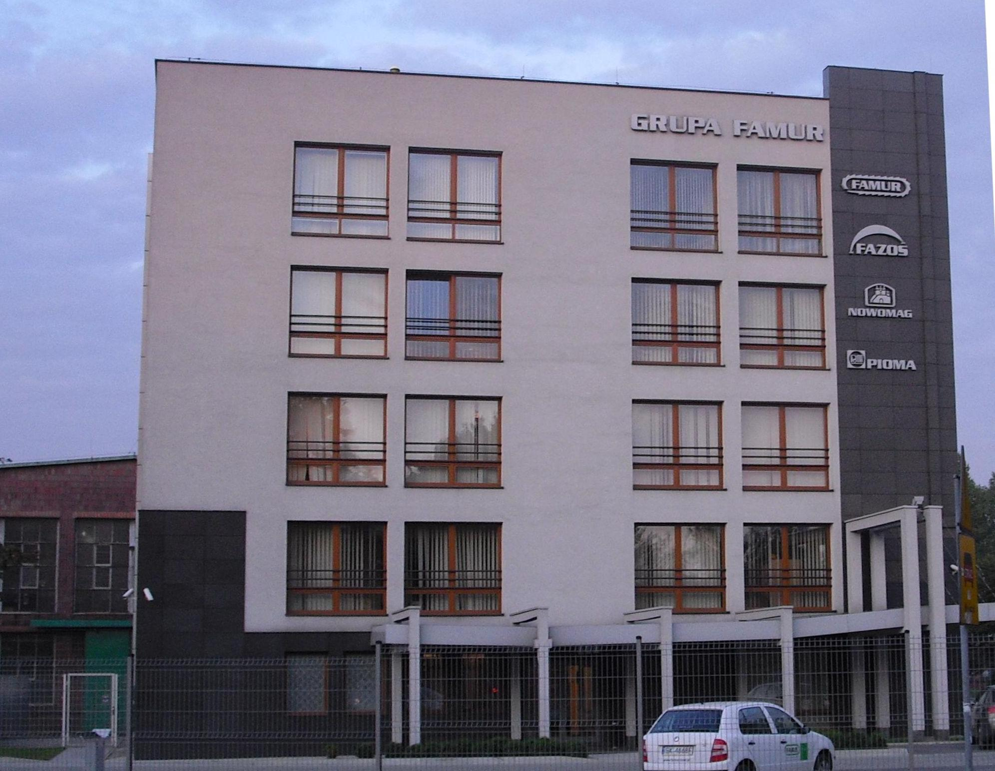 Fabryka Maszyn Górniczych "FAMUR"w Katowicach Piotrowicach, budynek dyrekcji